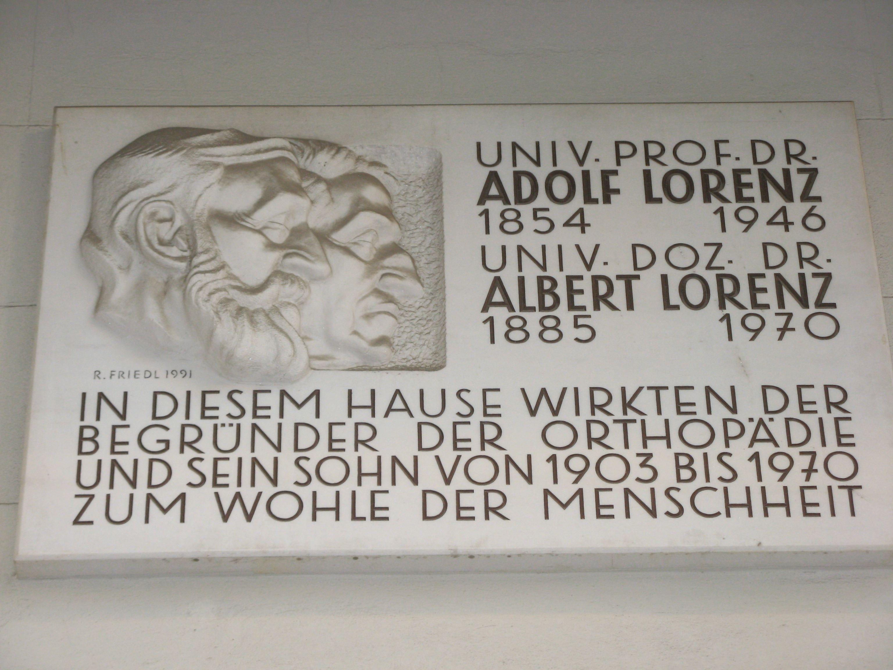 Gedenktafel für Adolf und Albert Lorenz (R. Friedl 1991) in 1010 Wien, Rathausstraße 21, öffentlich zugänglich an der Straßenseite